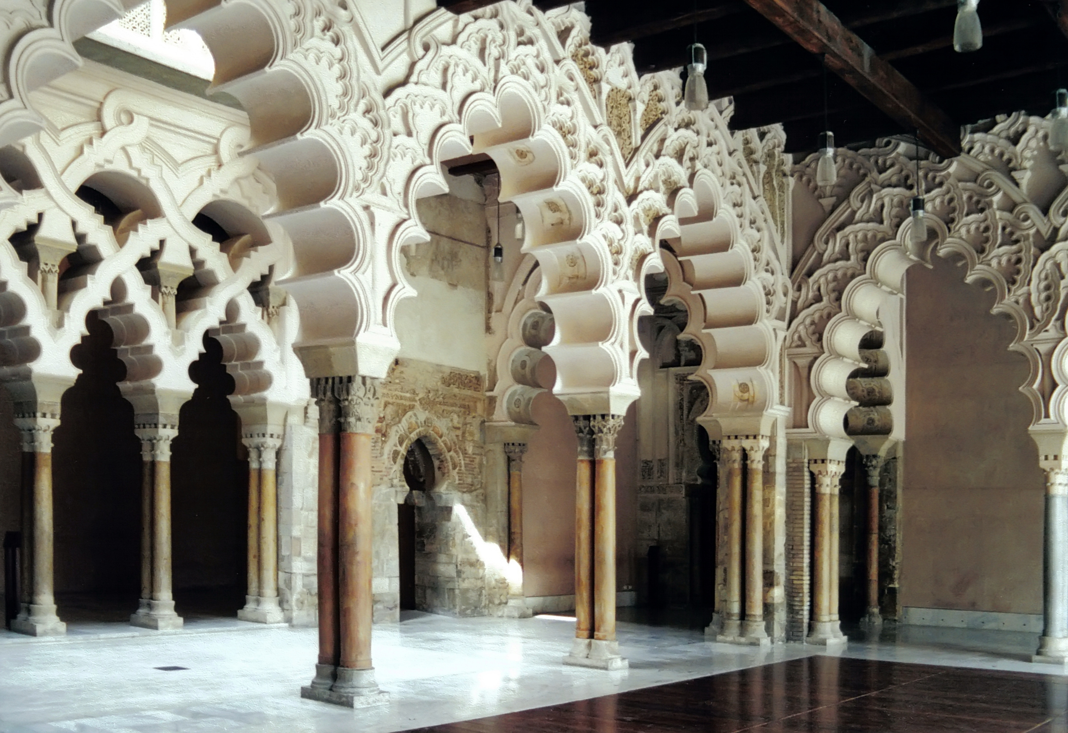 Aljaferia de Saragosse - Portique nord - Grands arcs polylobés brisés